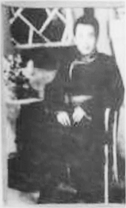 阿旺却吉旺其格，科尔沁右翼前旗葛根庙的第七世诺彦活佛，摄于青年时期